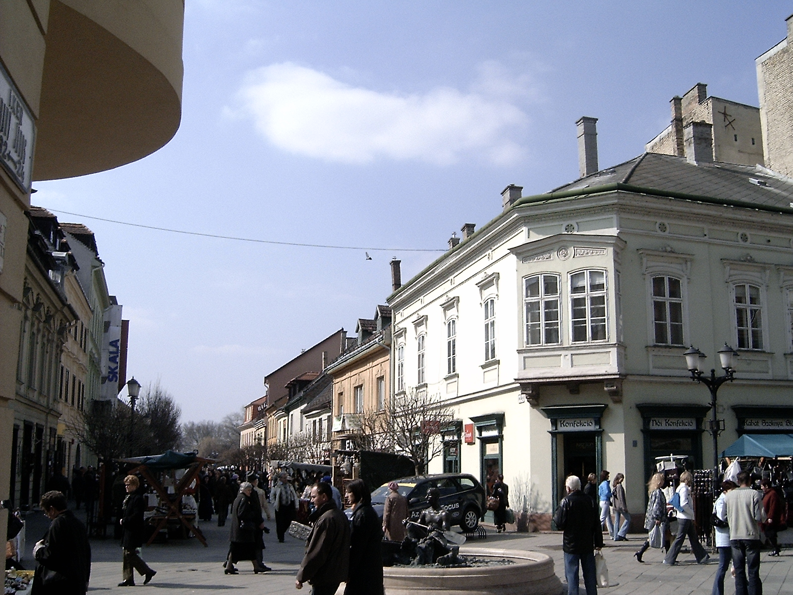 Arany János utca (Győr), saját kép